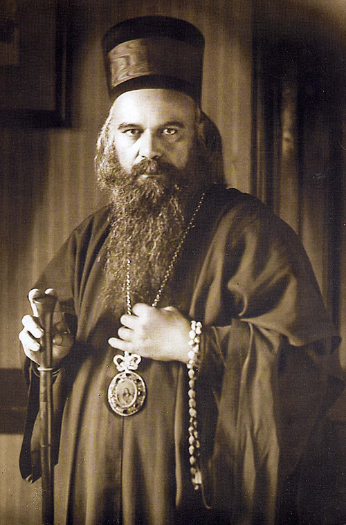 епископ Николай (Велимирович)